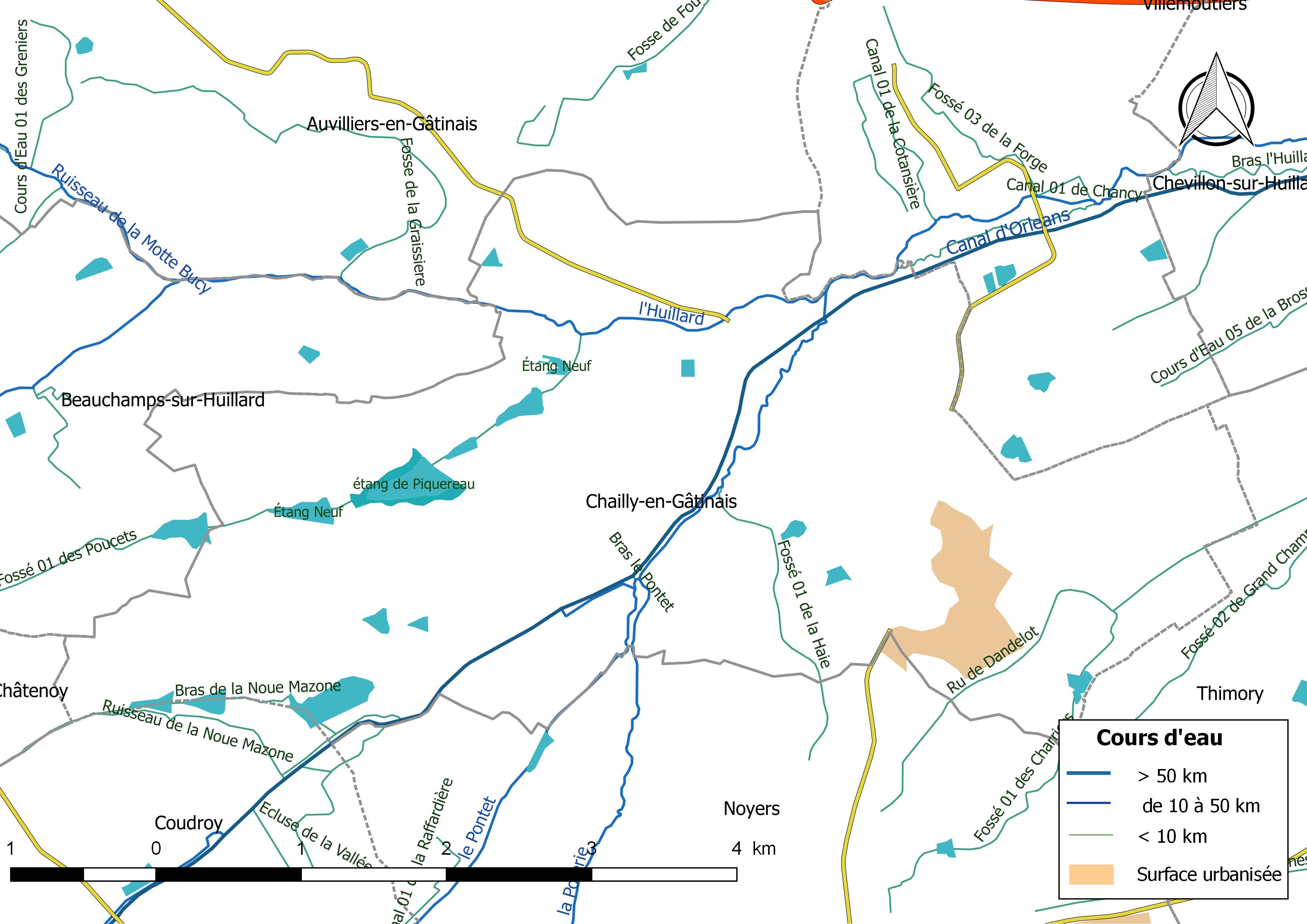 Carte du réseau hydrographique de la commune de Chailly-en-Gâtinais (France).